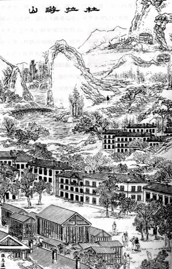 苏格兰 杜拉镇 此图刻于1890年